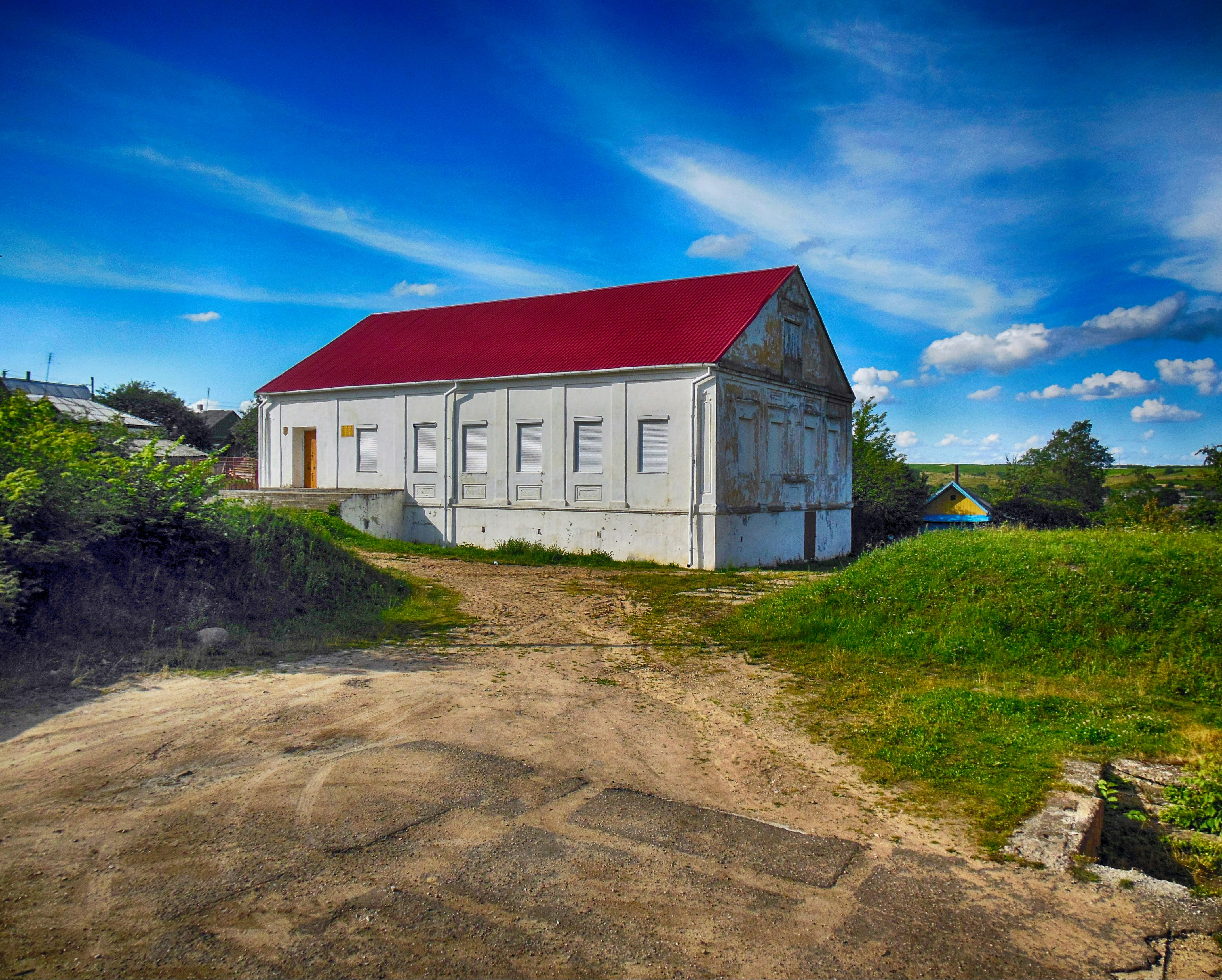 Беларуская (тарашкевіца): Будынак былога ешыбота. г. Валожын This is a photo of Belarusian heritage monument. Reference number: 612Г000072 ( WLM)